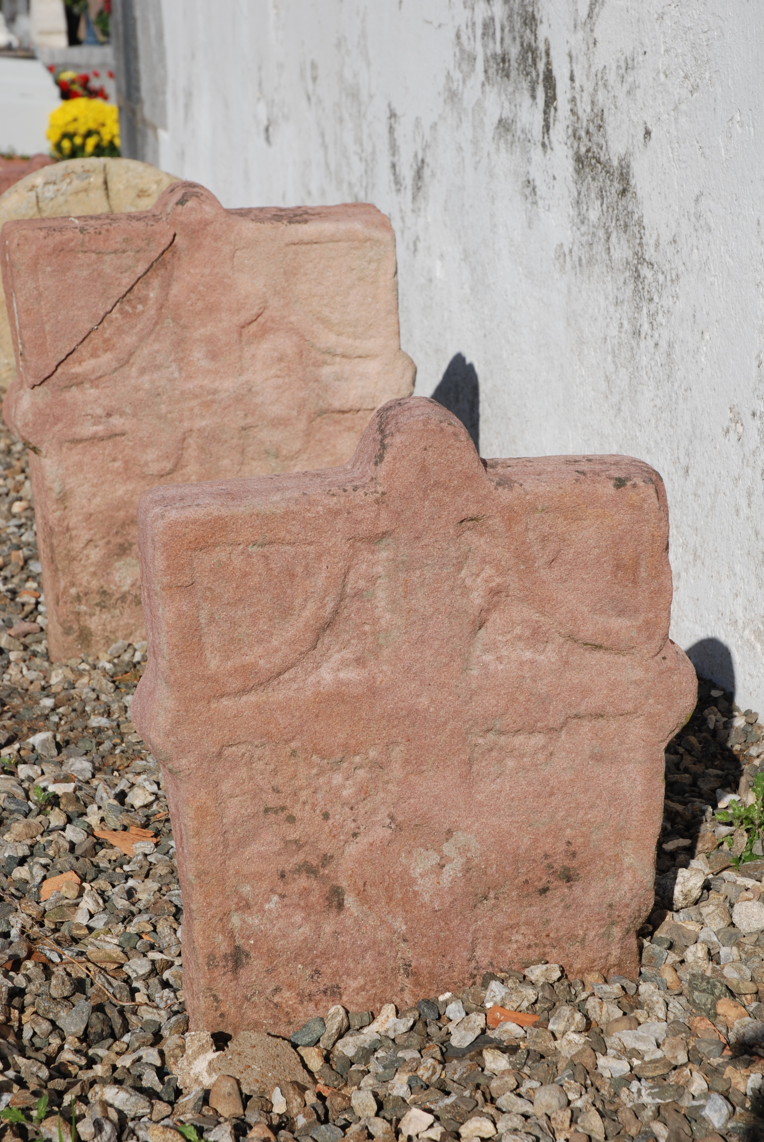 Itxassou, stèle basque